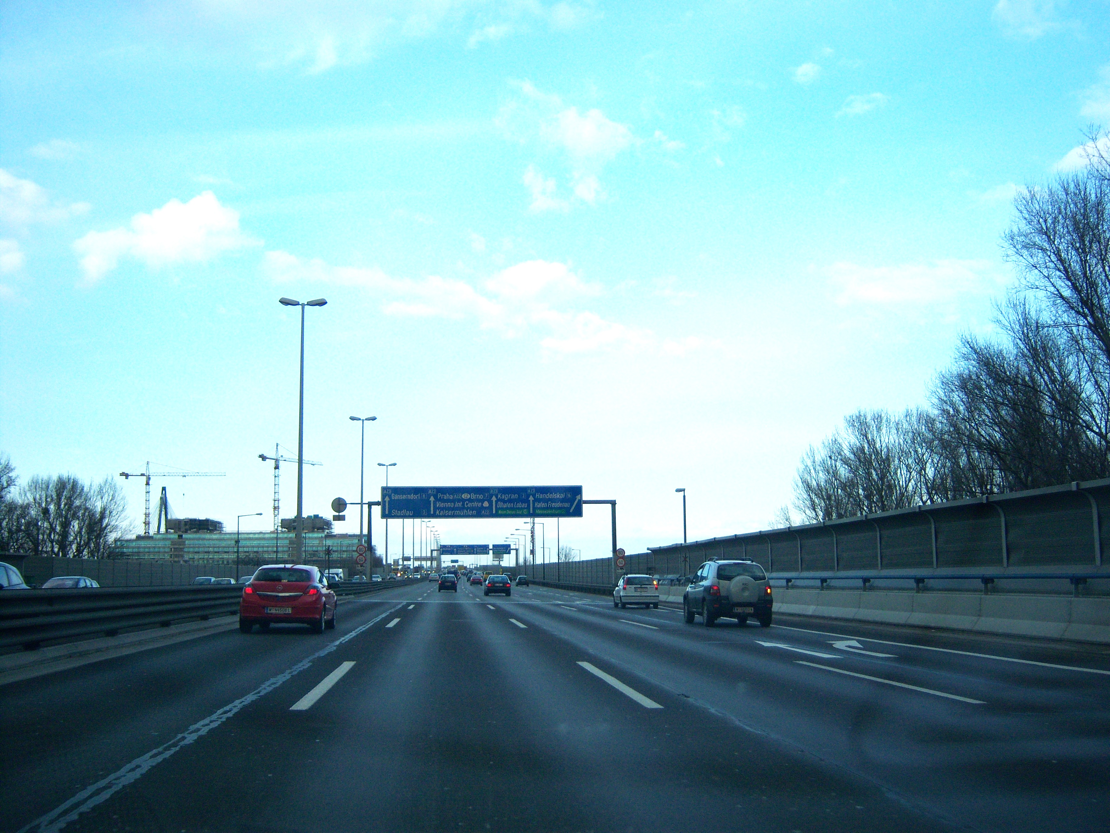 A23 vor der Anschlussstelle Handelskai